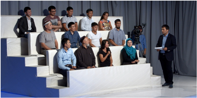 Мәміле бағдарламасы